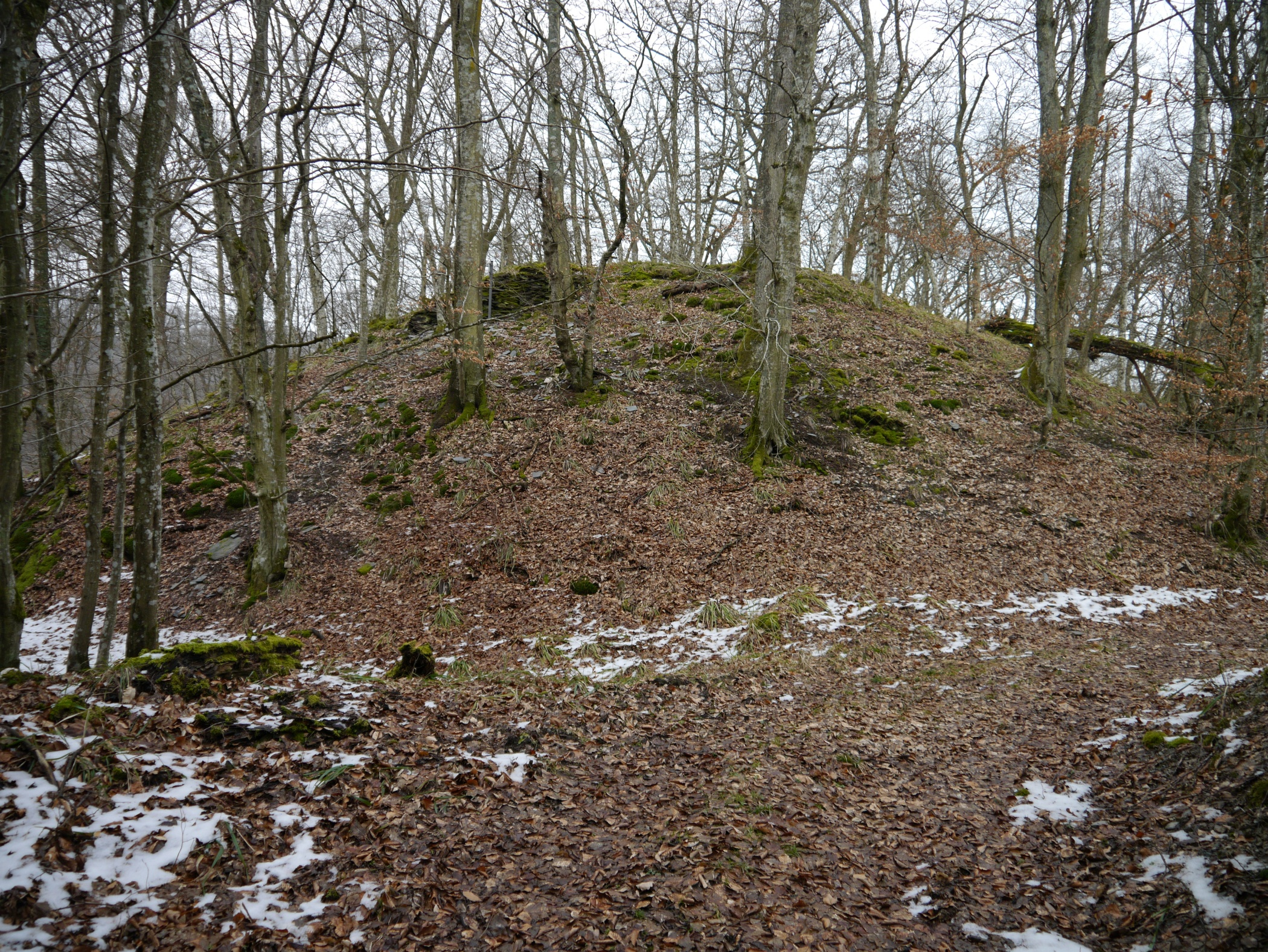 Die Alteburg ist eine ehemalige spätrömische Bergbefestigung im Hunsrück. Sie liegt auf einem Bergsporn im Altlayer Bachtal zwischen Zell und Altlay. Aufnahme Profil.